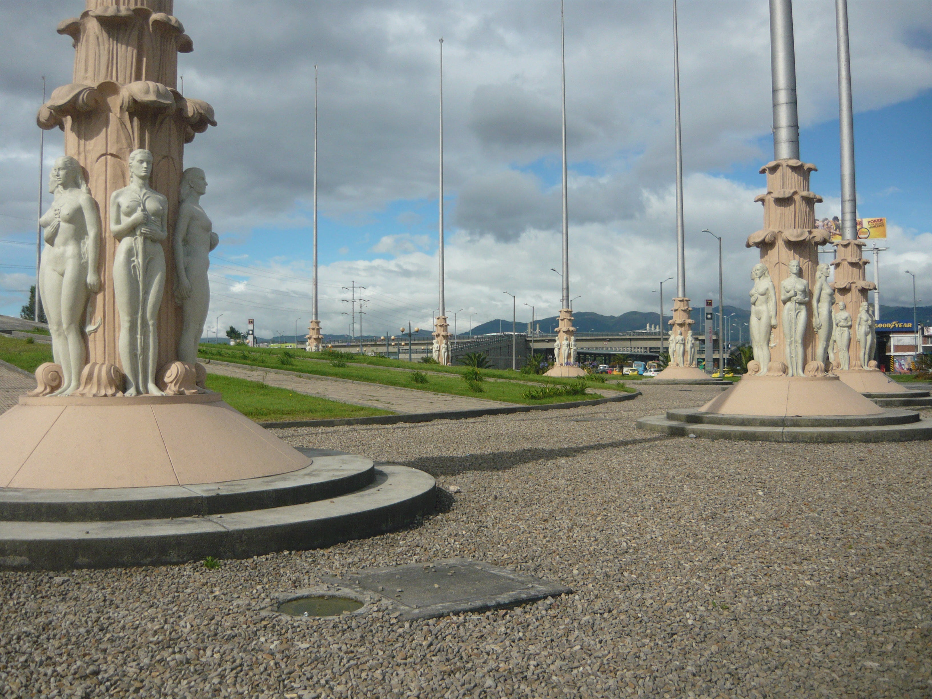 Fotografia del monumento a las banderas ubicado en la localidad de Kennedy (Bogota).